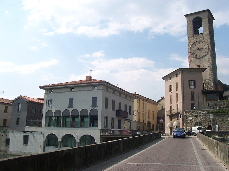 Palazzolo sull'Oglio - Torre della Rocchetta vista dal ponte romano